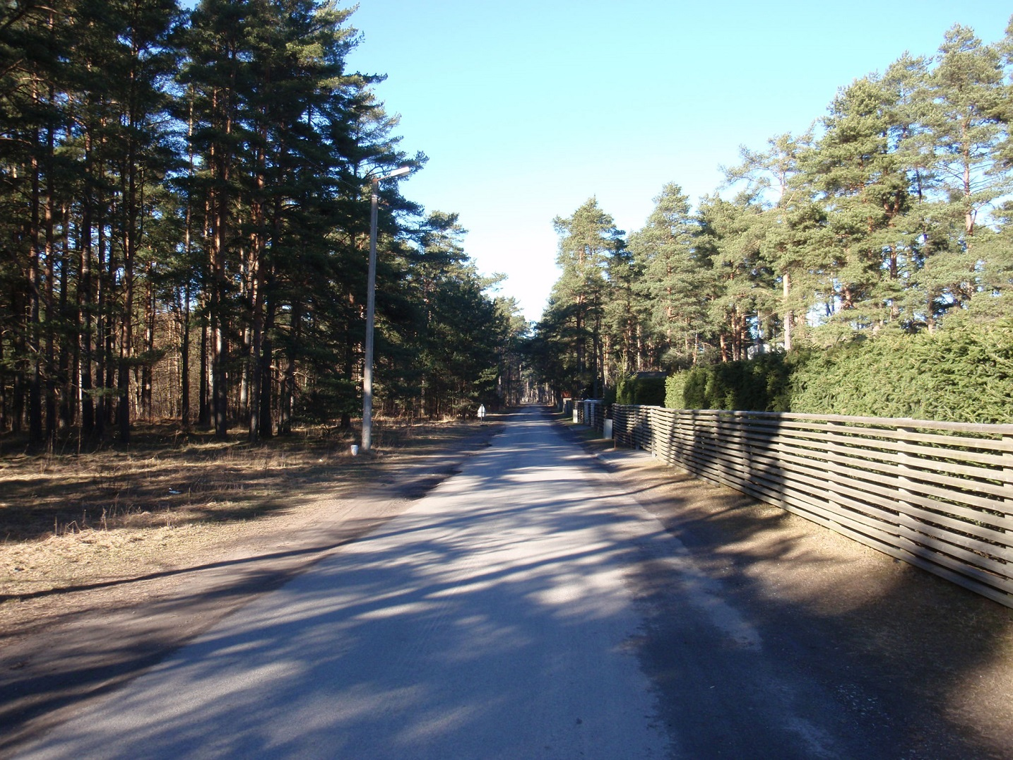 Sompa tee